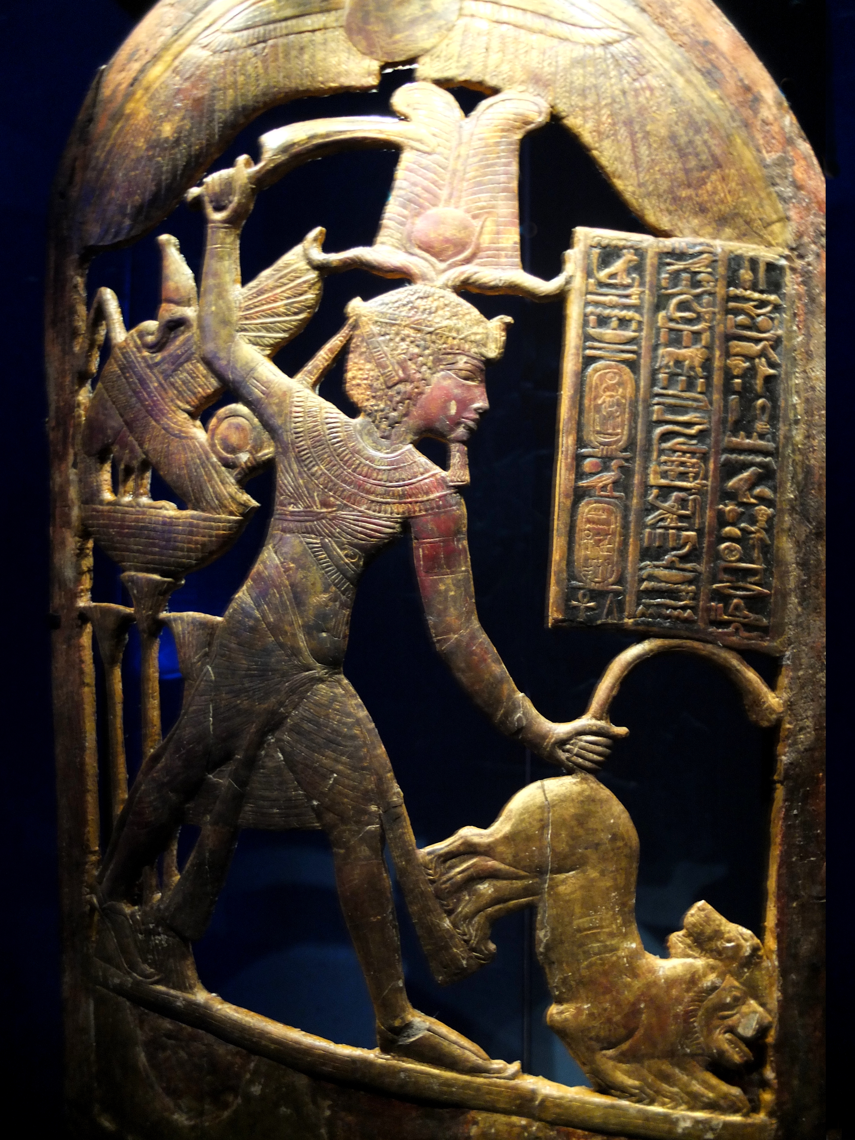 Bouclier d'apparat, bois doré et cuir, hauteur environ 88 cm. Annexe du tombeau, Carter 379b. Musée du Caire. Exposé lors de "Toutânkhamon, le trésor du pharaon" mars-septembre 2019, Grande halle de La Villette, Paris.